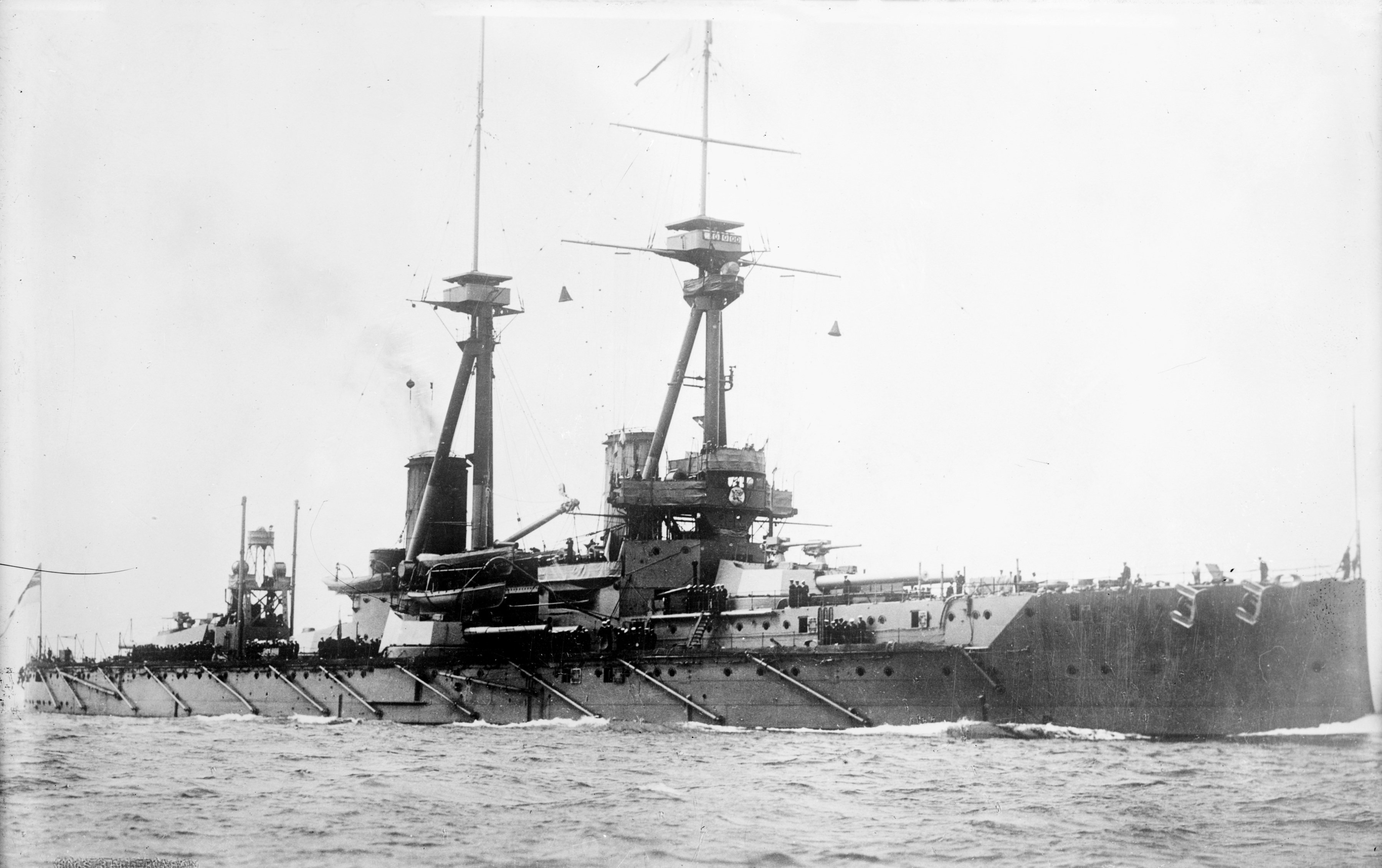 HMS Bellerophon